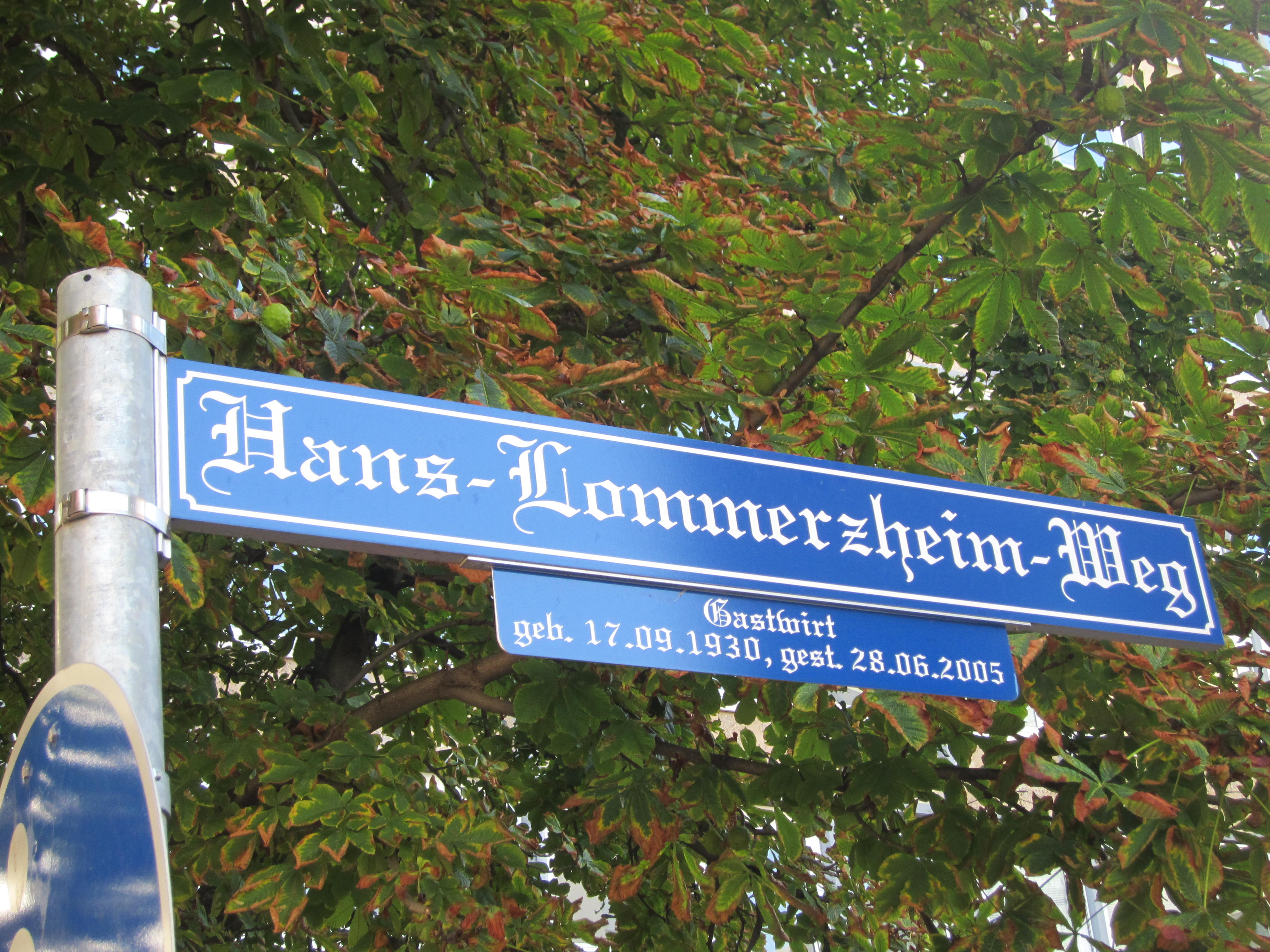 Straßenschild "Hans-Lommerzheim-Weg" (2012)